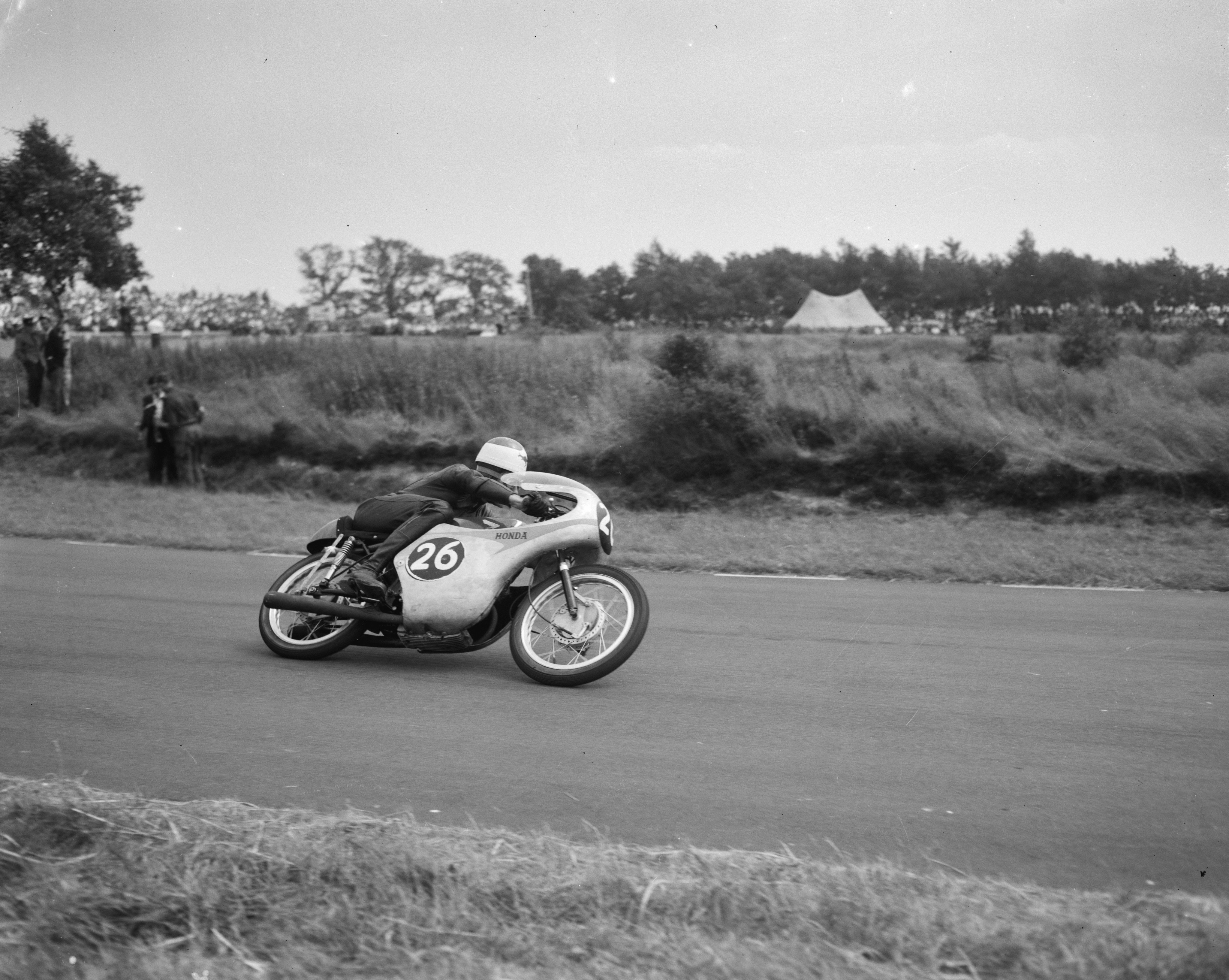 Collectie / Archief : Fotocollectie Anefo Reportage / Serie : TT Assen 1961 Beschrijving : 125cc-race: nummer 26 Tom Phillis op Honda Datum : 24 juni 1961 Locatie : Assen Trefwoorden : RACES, motorsport Persoonsnaam : Phillis, Tom Instellingsnaam : TT Fotograaf : Bilsen, Joop van / Anefo Auteursrechthebbende : Nationaal Archief Materiaalsoort : Negatief (zwart/wit) Nummer archiefinventaris : bekijk toegang 2.24.01.04 Bestanddeelnummer : 912-6406